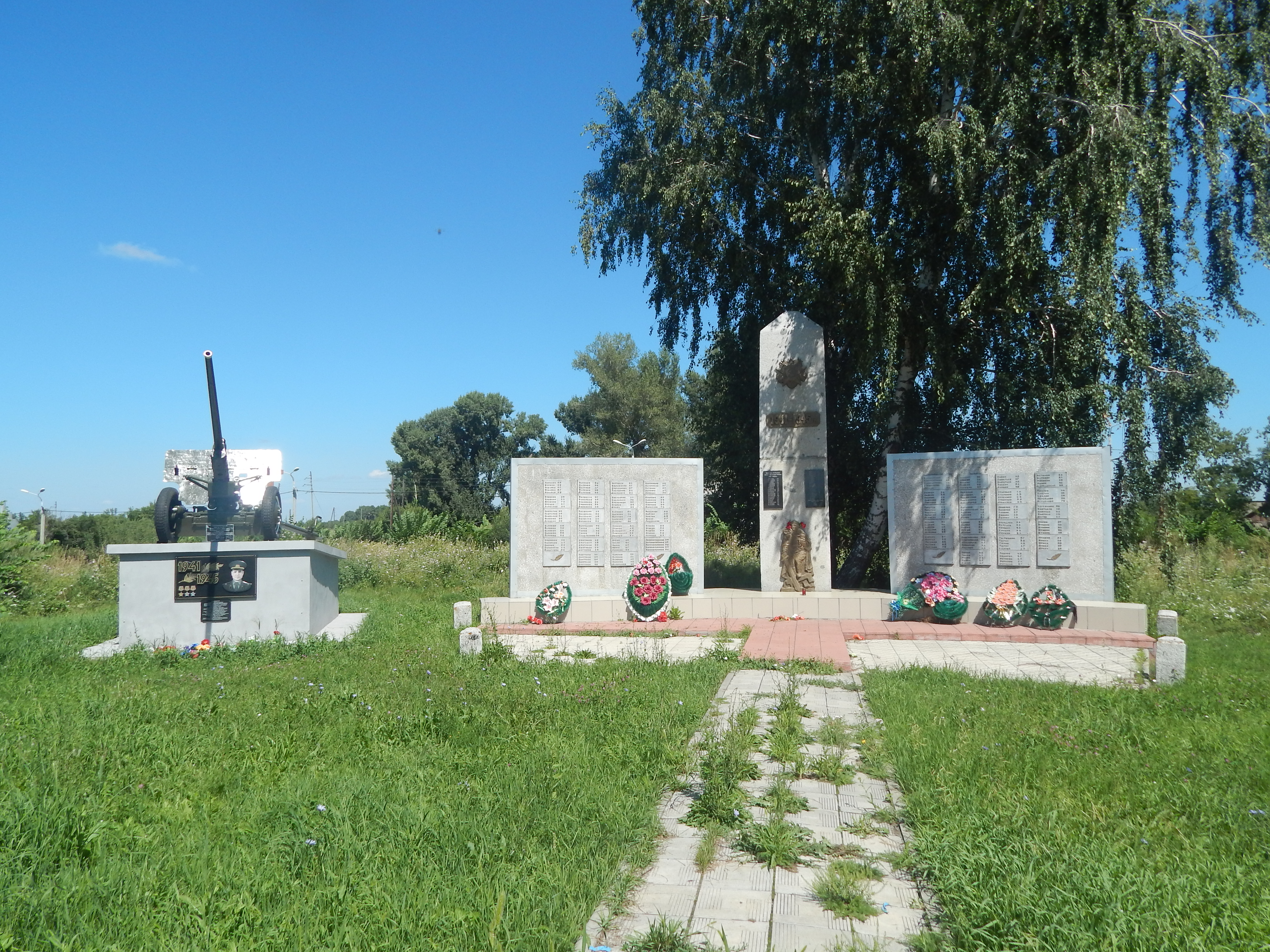 Обелиск воинам, погибшим в годы Великой Отечественной войны: Чуйский тракт, Сростки, Бийский район, Алтайский край